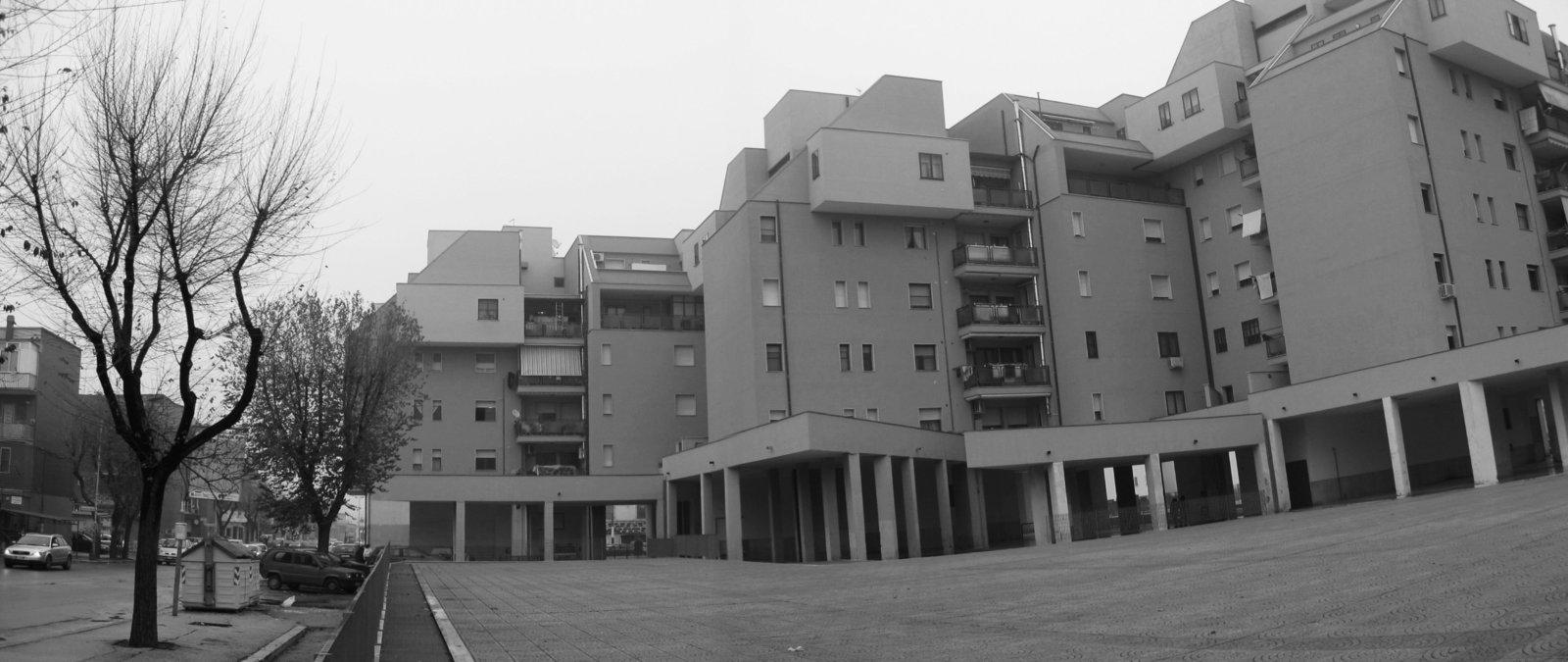 Viale Candelaro - 71100 Foggia